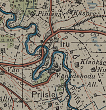 Iru 1936. aasta Tallinna ümbruse kaardil